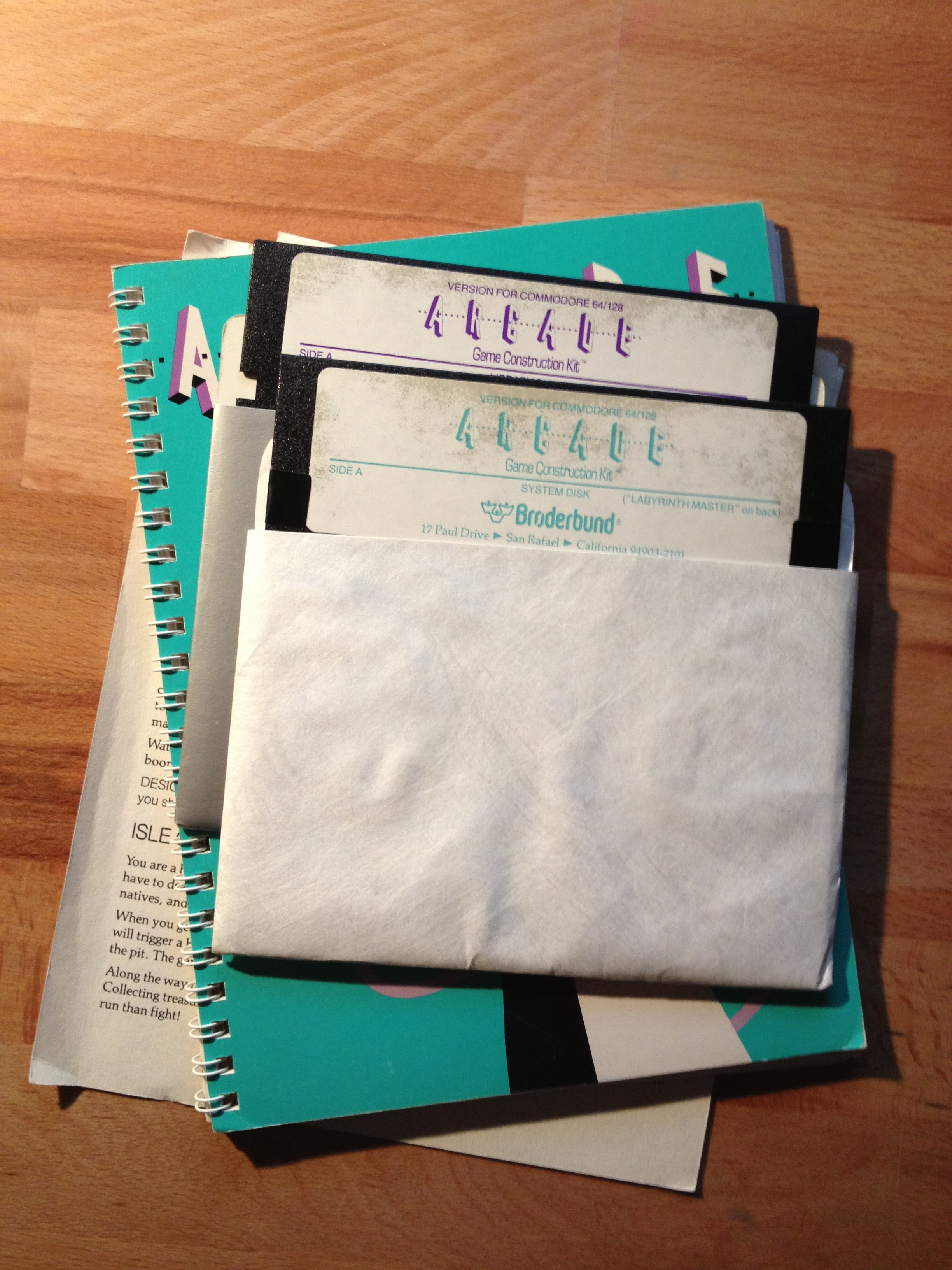 Disks für Arcade Game Construction Kid für den C64 und C128